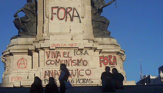 FOTO MONUMENTO